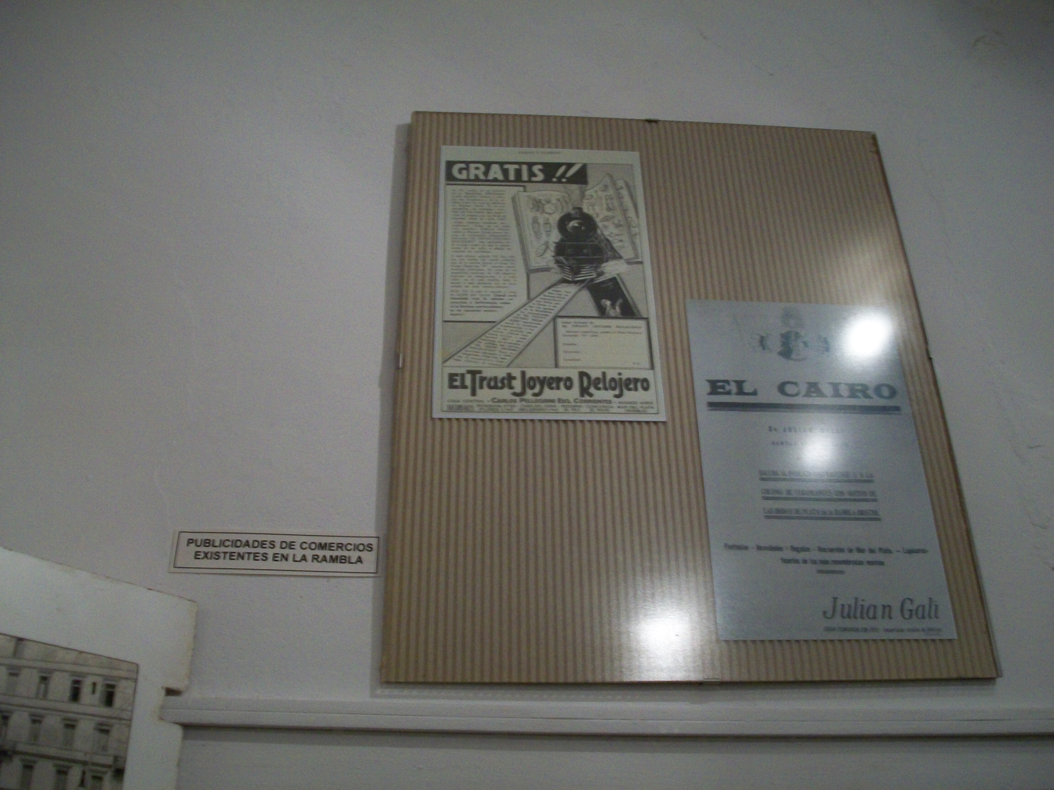 Museo Hist¾rico Municipal Don Rodolfo T. Barili, Mar del Plata, Argentina